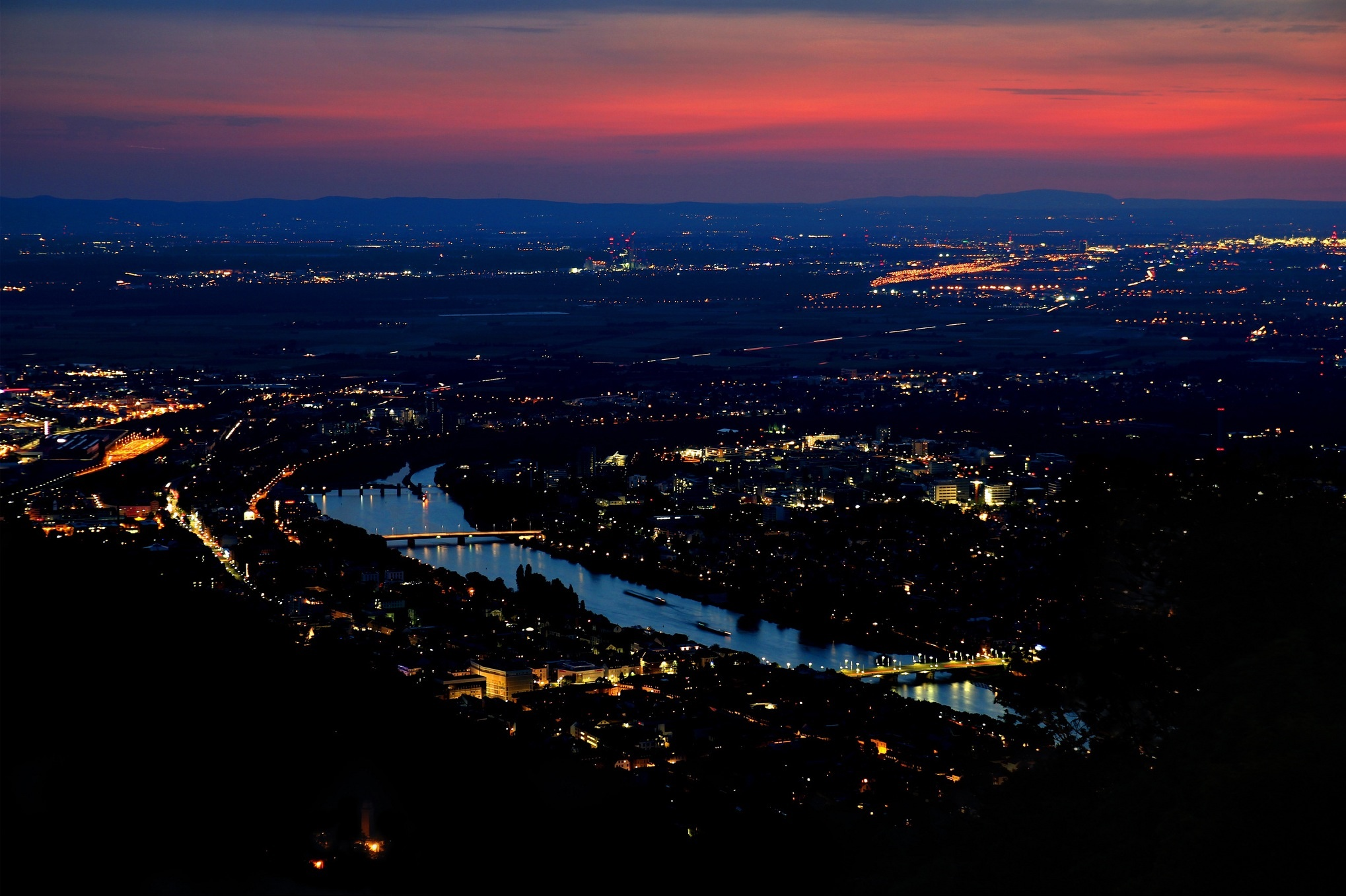 Nachtblick vom Königsstuhl auf Heidelberg